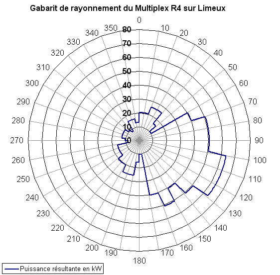 gabarit de rayonnement émetteur de Limeux Mux R4